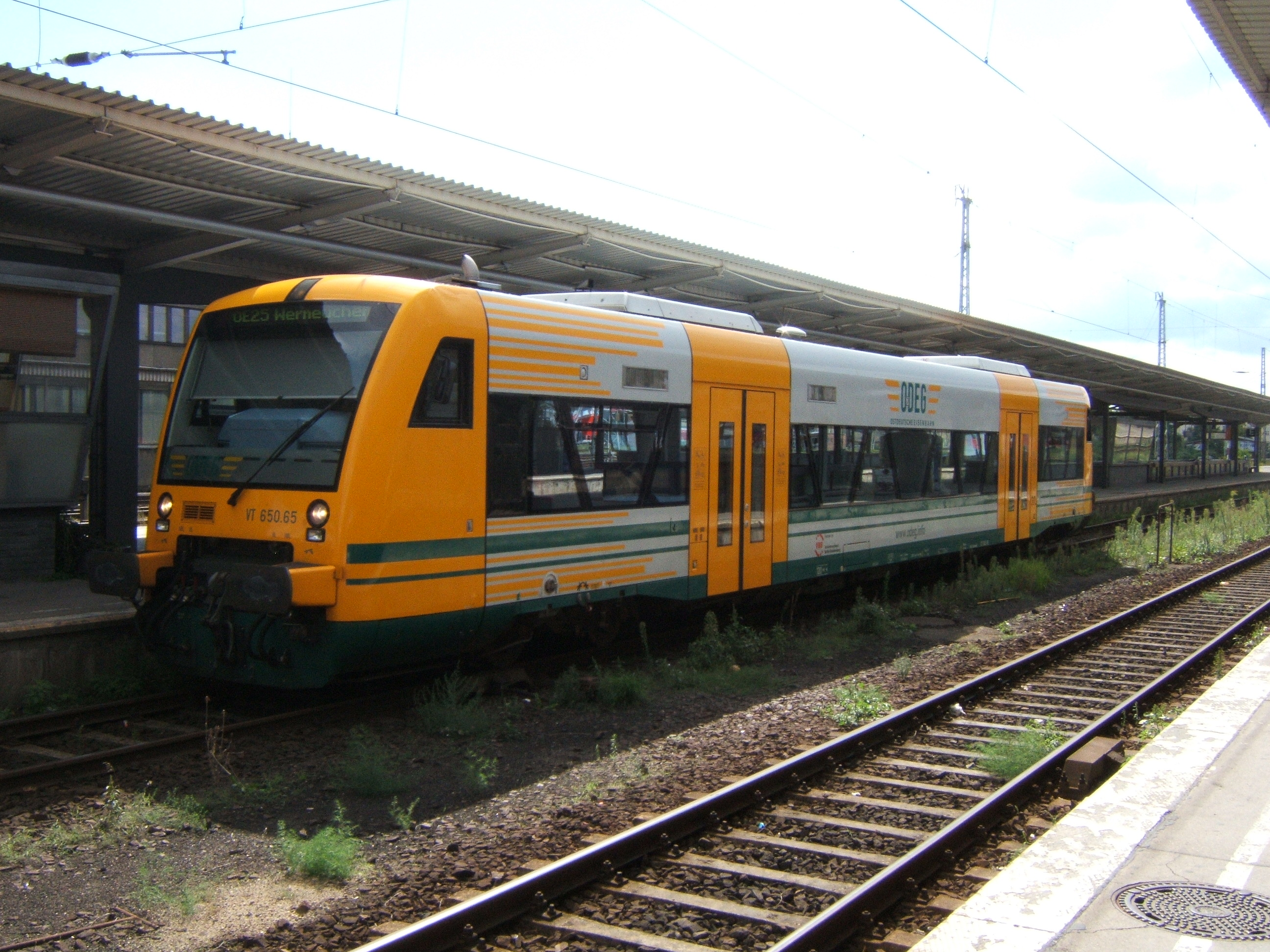 Lokale ODEG trein in Berlijn Lichtenberg. Sommige zijlijnen vertrokken niet van het centrum van Berlijn.